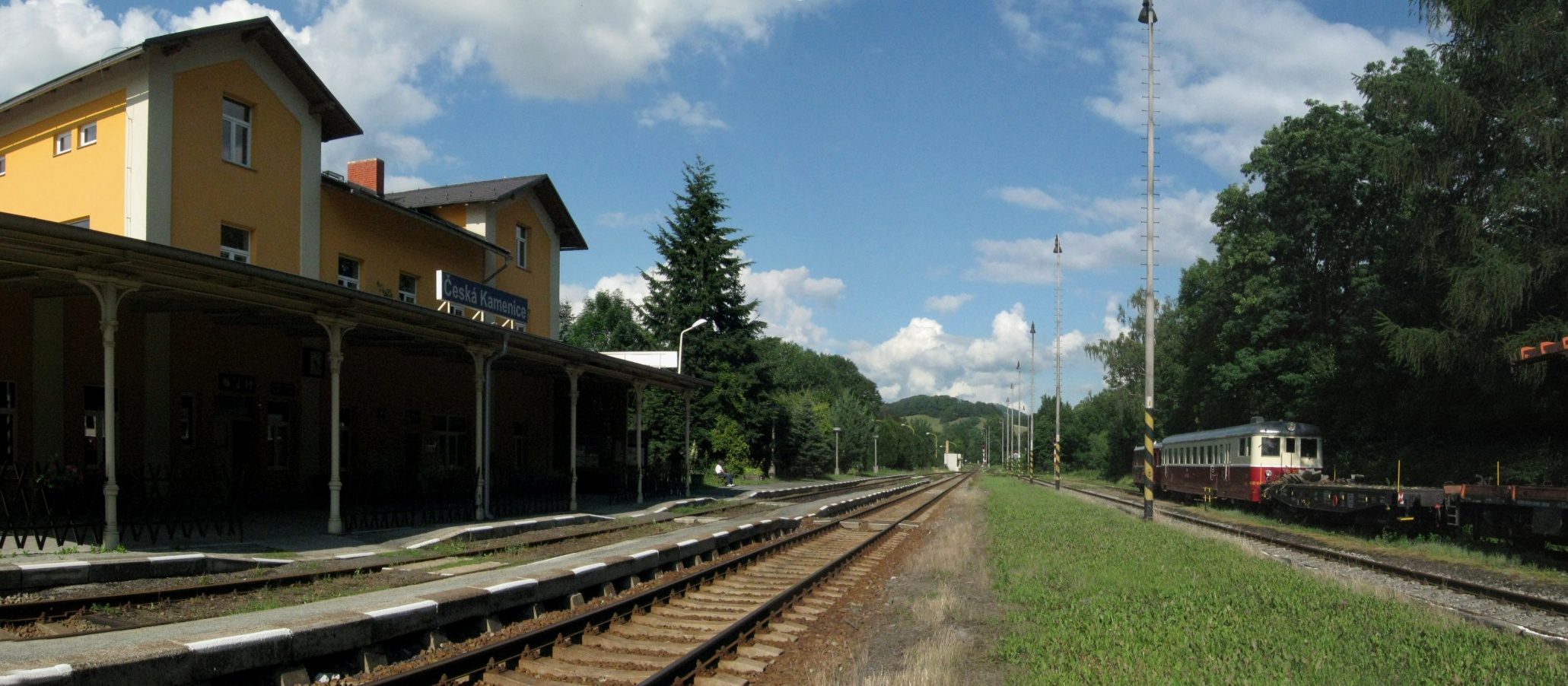 Českokamenické nádraží